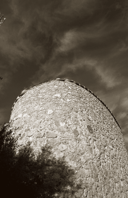 Fotografia de la torre de la fundación ACA en Buger Mallorca